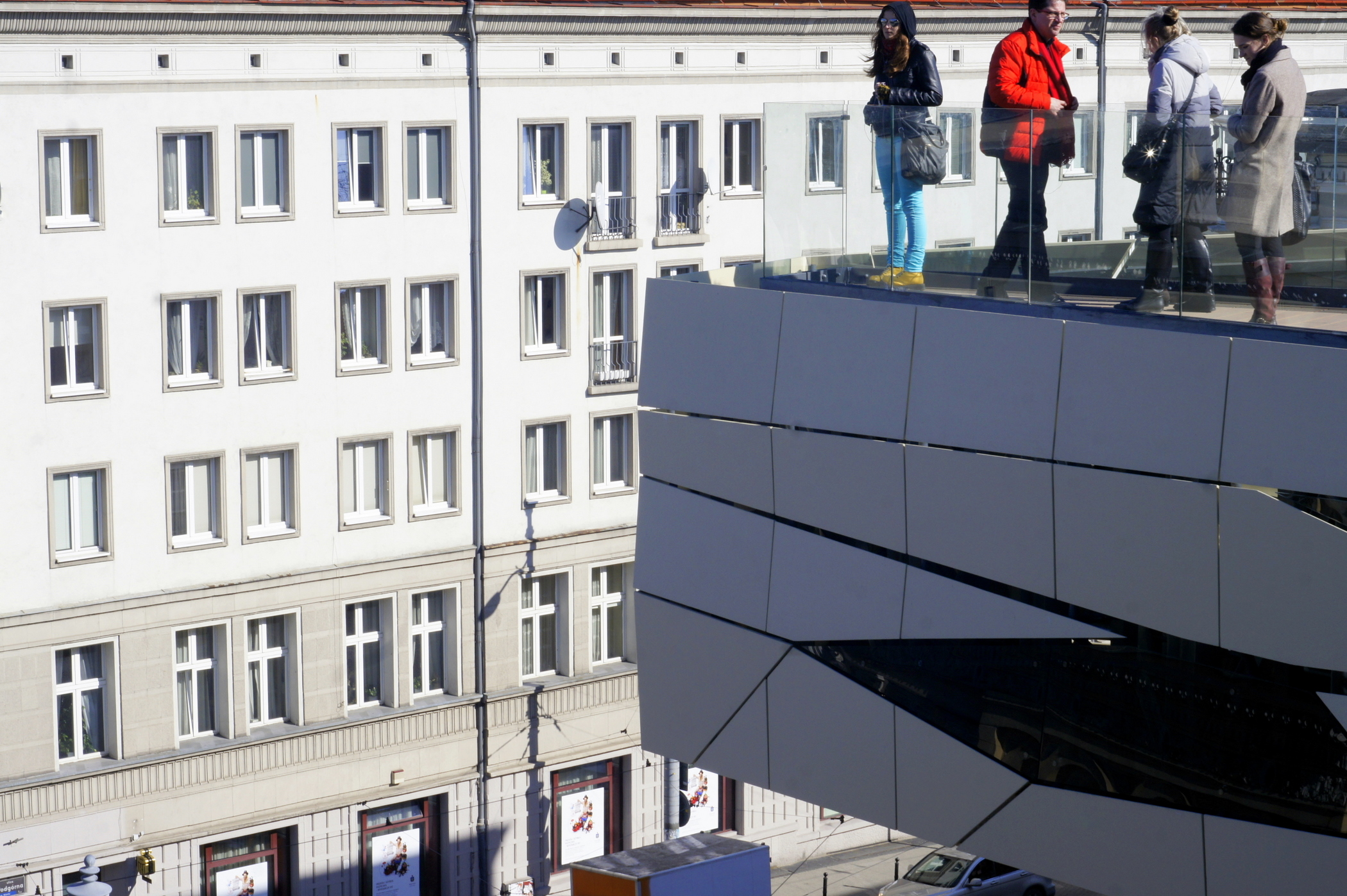 Taras widokowy budynku usługowego (Galeria Handlowa MM w Poznaniu, nad Al. Marcinkowskiego)